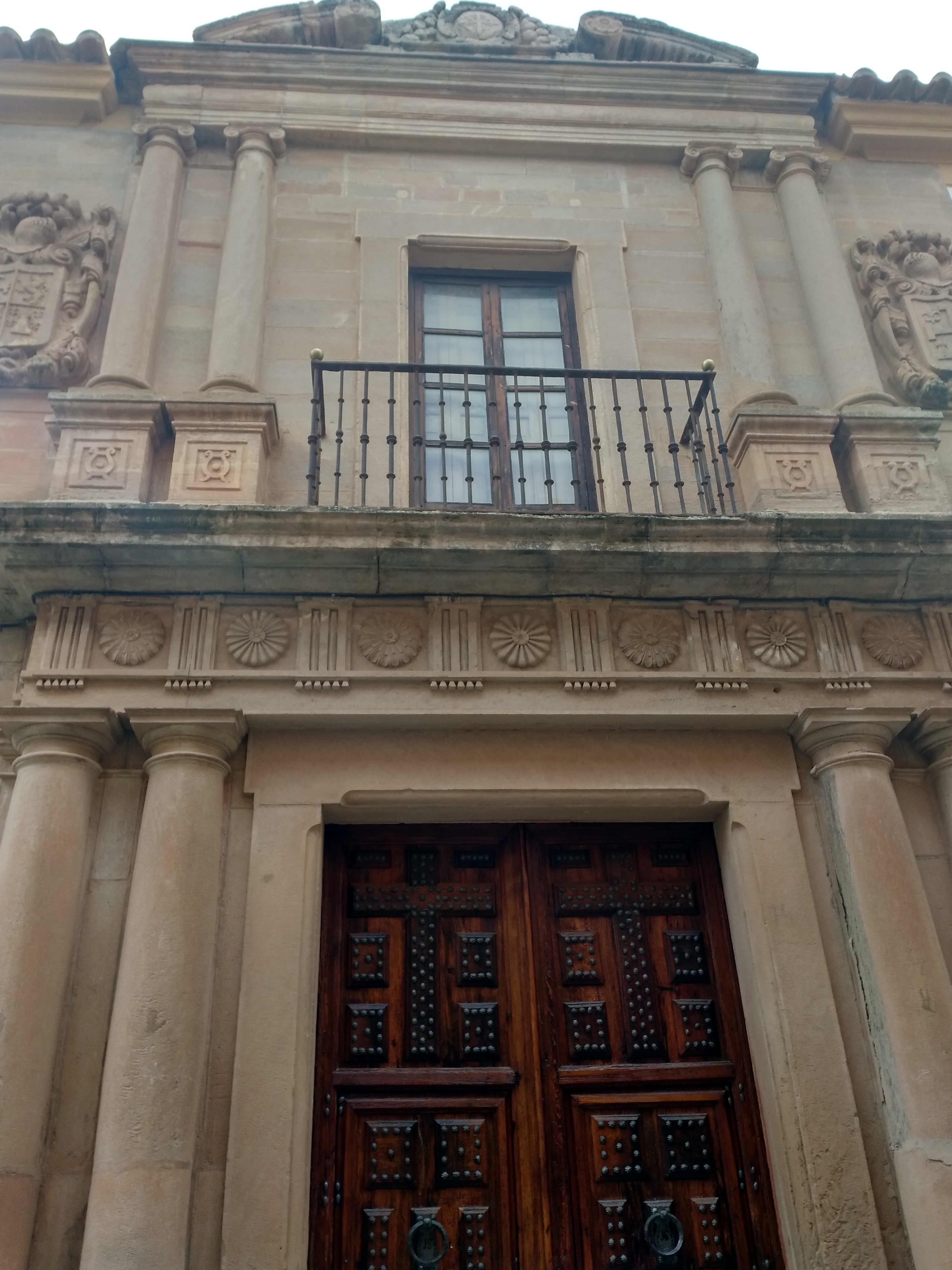 Fachada del Palacio del Marqués de Melgarejo.